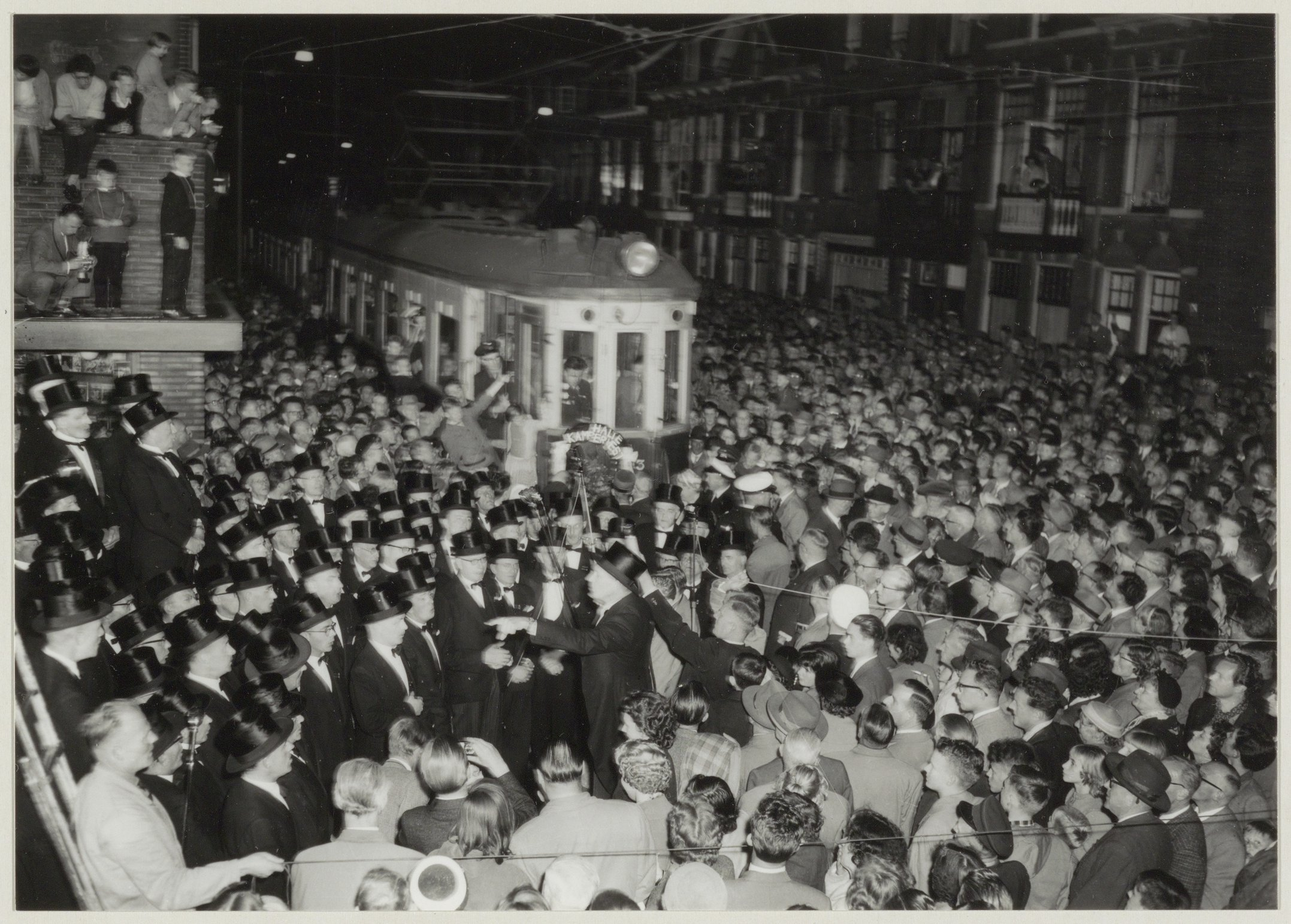 CollectieCollectie Fotoburo de BoerInventarisnummerNL-HlmNHA_54010436NL-HlmNHA_1478_14905B.BeschrijvingLaatste rit van de electrische tram Amsterdam-Zandvoort van de N.Z.H. op 31 augfustus 1957. Foto: Mannenkoor Zang en Vriendschap zingt het ' Requiem op de blauwe' als afscheid.FotonummerNL-HlmNHA_1478_3837DocumenttypeHistorieprenten, tekeningen en foto'sVervaardigerBoer, Cees de (1918-1985) Soort vervaardigerFotograaf AnnotatiesI2-78LandNederland ProvincieNoord-Holland GemeenteHaarlem PlaatsHaarlem StraatTempeliersstraat GeografischKoninginnebuurt Begindatum31-08-1957Einddatum31-08-1957Datering gebeurtenis31-08-1957TechniekFoto TrefwoordenBlauwe Tram